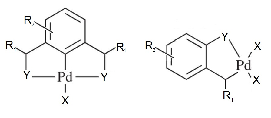 Aunque existen otras estructuras genéricas para un paradaciclo, estas son las dos más típicas